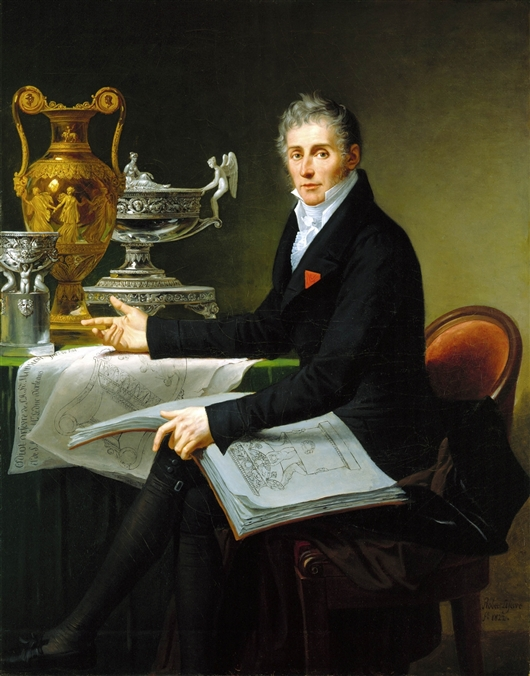 Portrait de l'orfèvre Jean-Baptiste Claude Odiot.